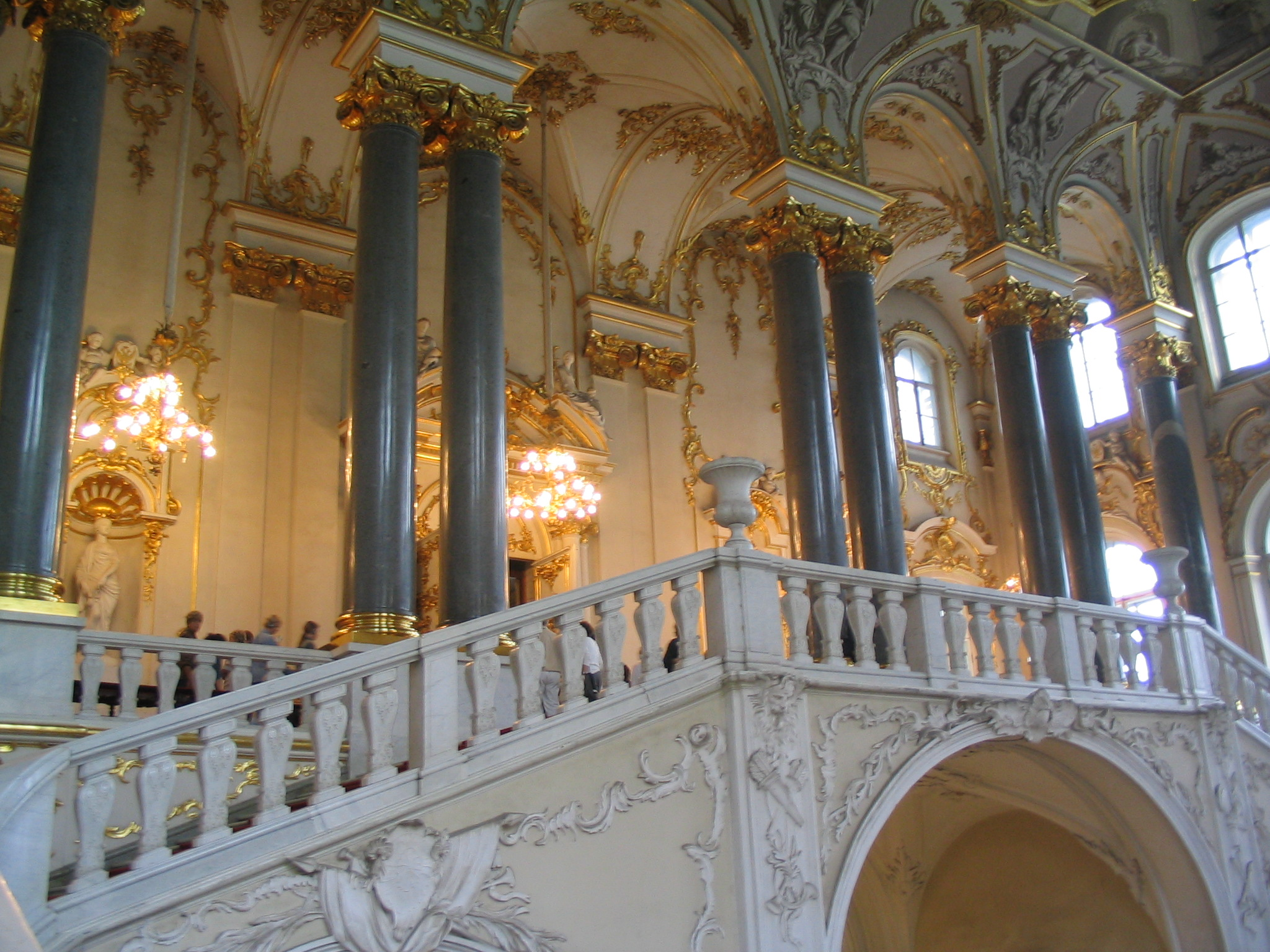 Jordantreppe im Petersburger Winterpalast.